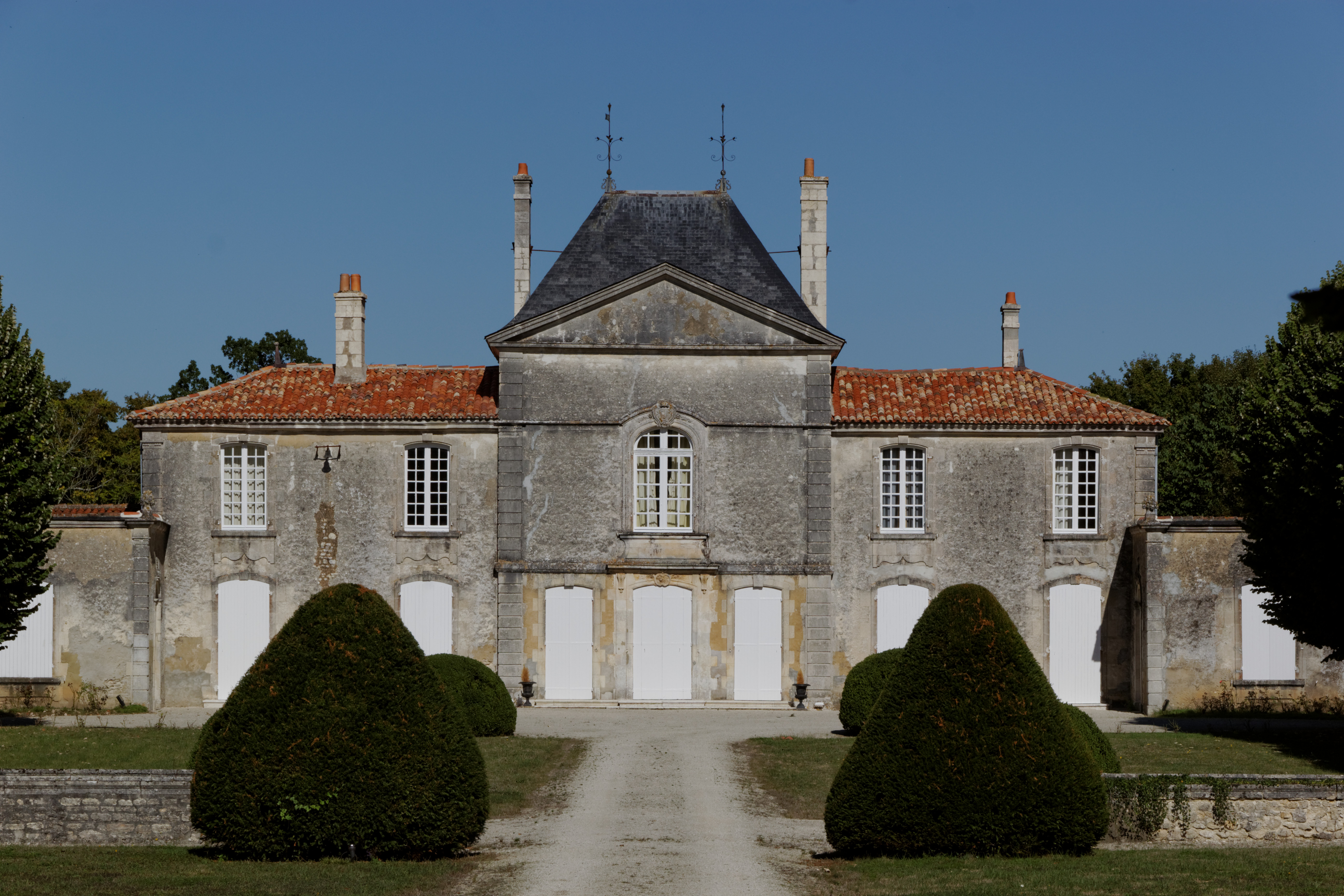 Château de Beaufief (Inscrit) .